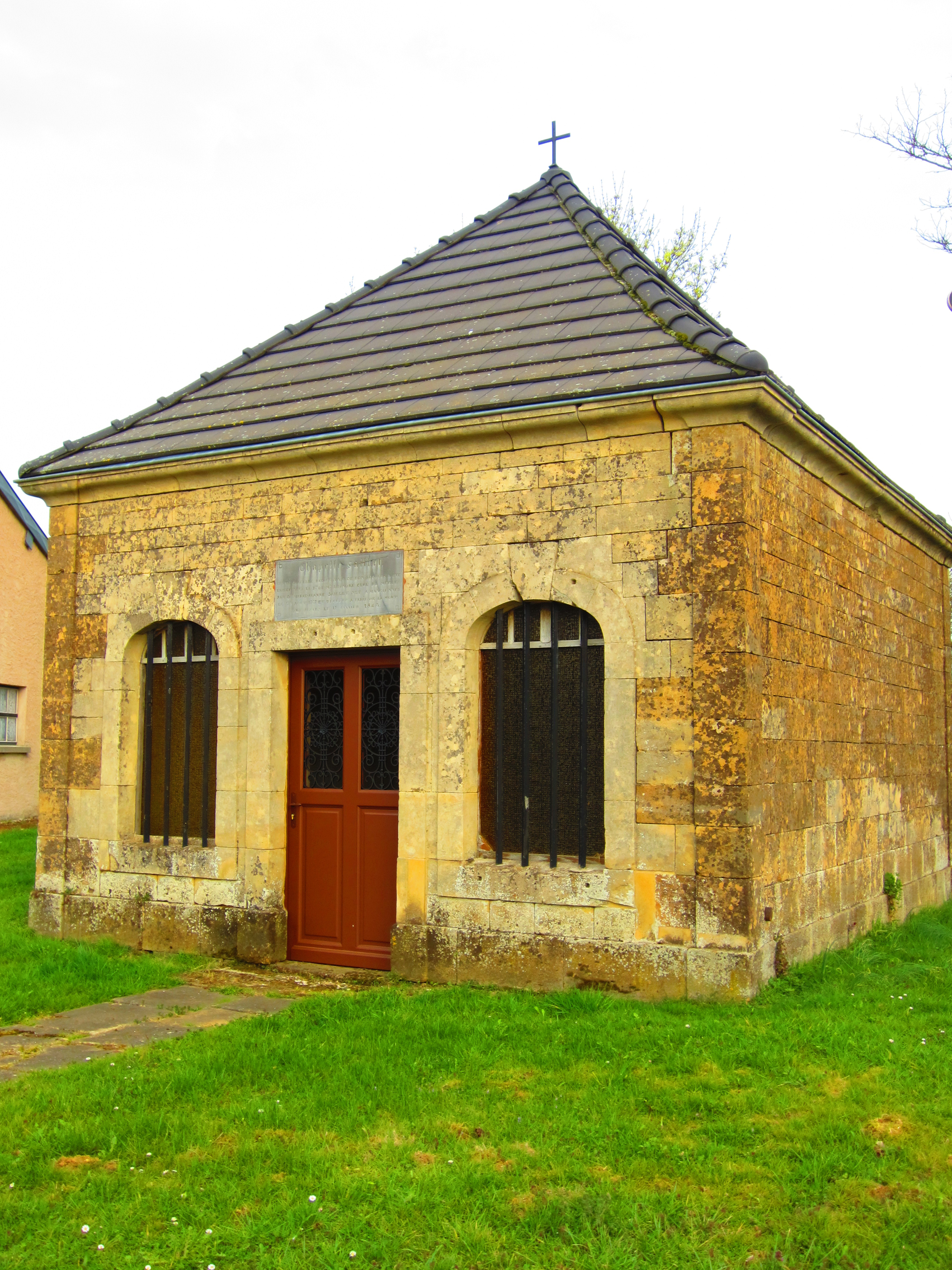 Villers-lès-Mangiennes chapelle Notre-Dame-de-Bon-Secours